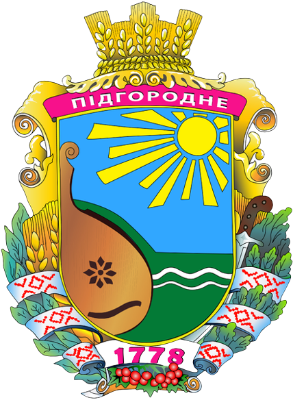 Герб м. Підгородне